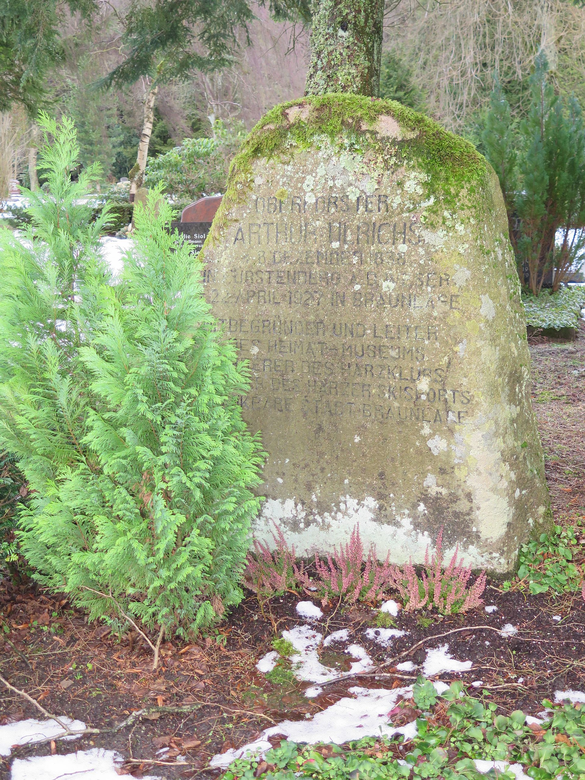 Grabstein von Oberförster Arthur Ulrichs auf dem Friedhof von Braunlage